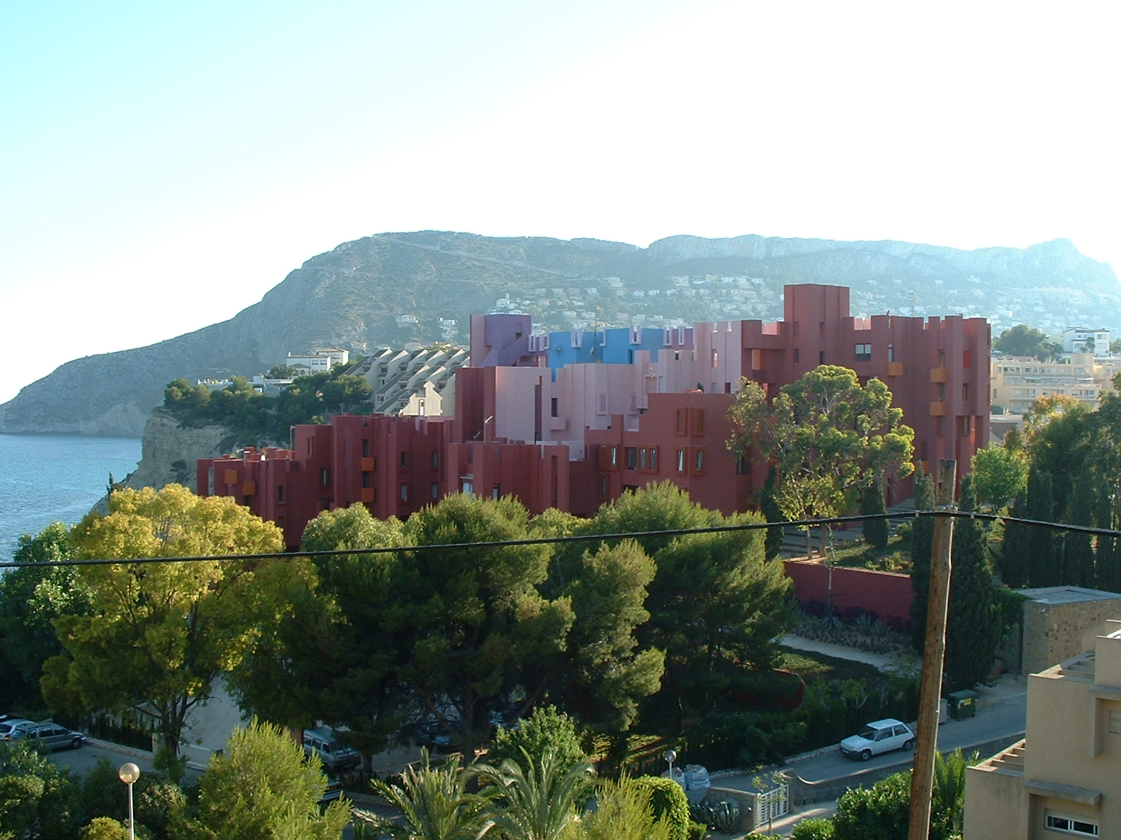 Edificio de la Muralla Roja en Calpe. Arquitecto Bofill